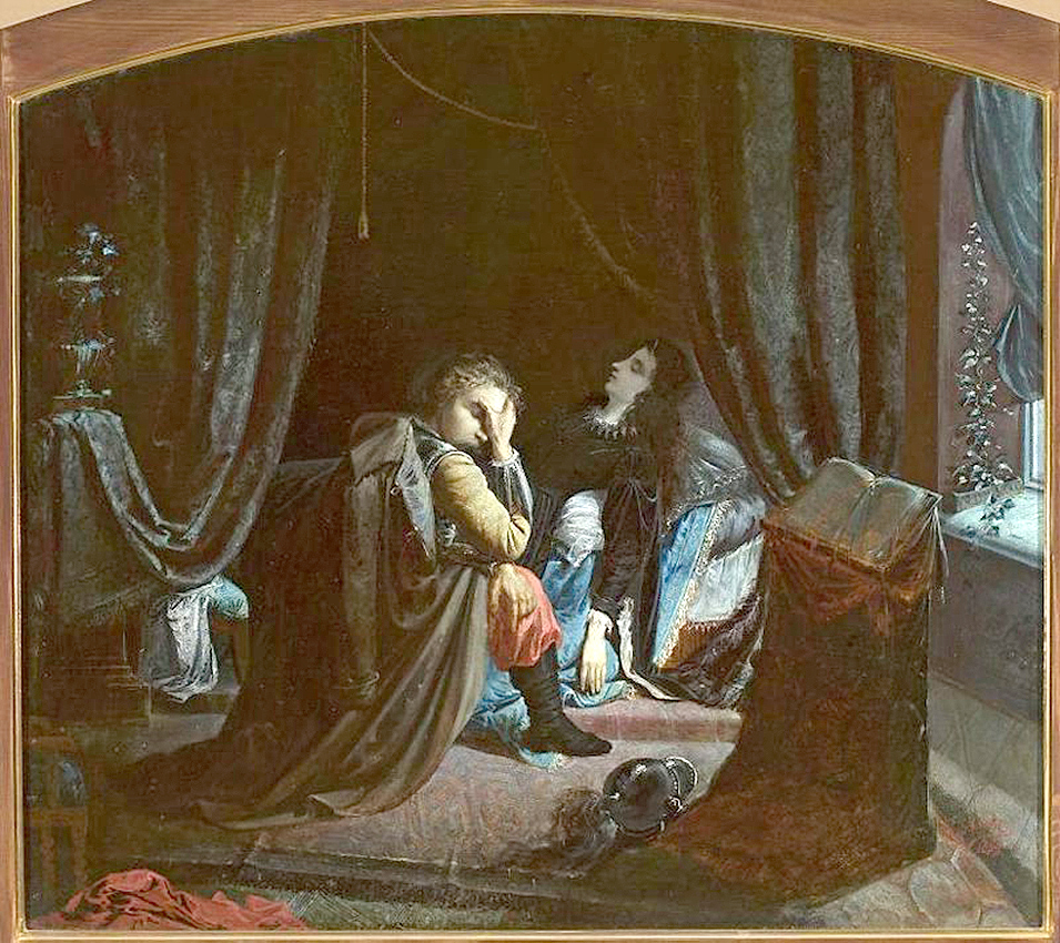 Śmierć Marii - Obraz wg powieści Antoniego Malczewskiego „Maria""